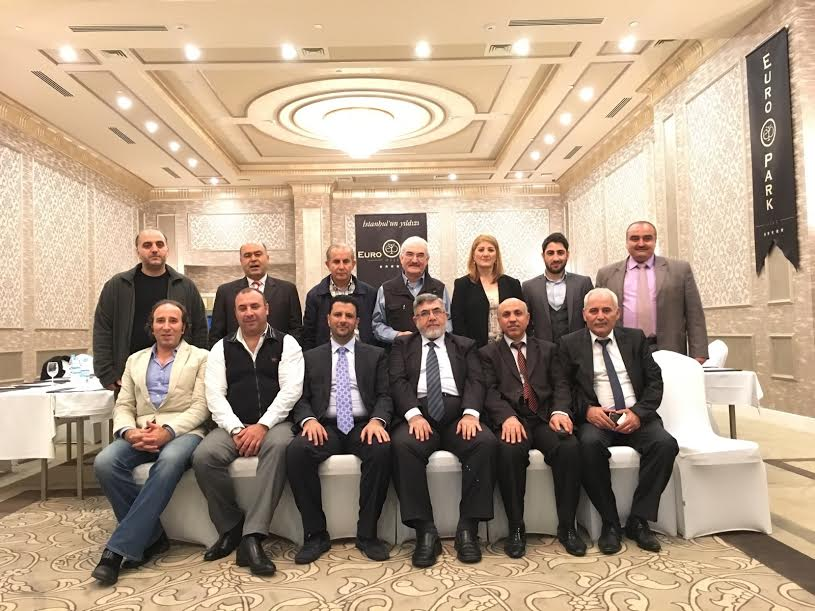 إجتماع لأعضاء الامانة العامة للجميعة الوطنية السورية في اسطنبول